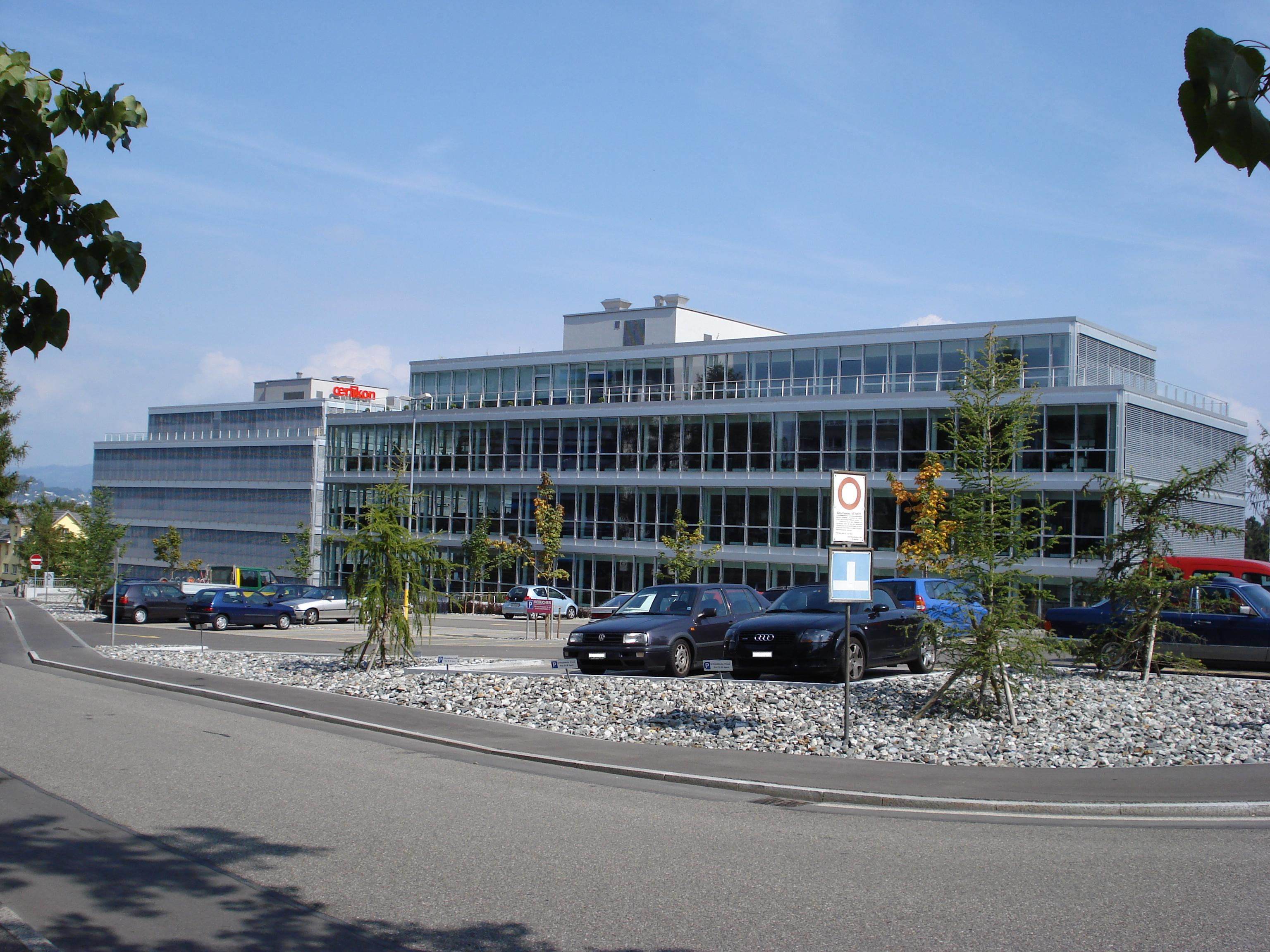 OC Oerlikon an der Churerstrasse und die LGT an der Schützenstrasse in Pfäffikon (Switzerland)